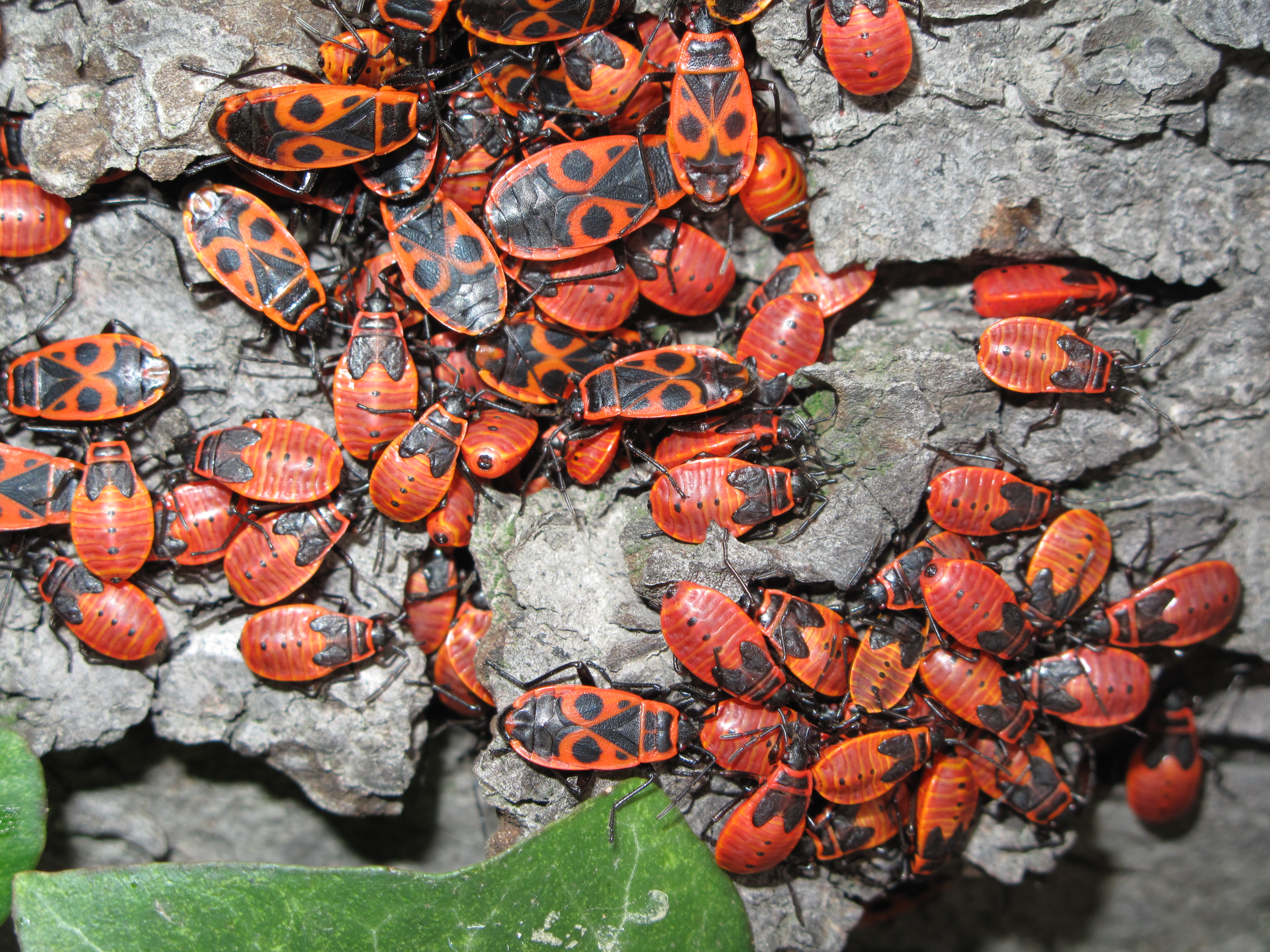 Ruměnice pospolné